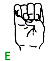 Buchstabe E im deutschen Fingeralphabet, gemäß einer Infokarte der Deutschen Gehörlosenhilfe Bayern e.V